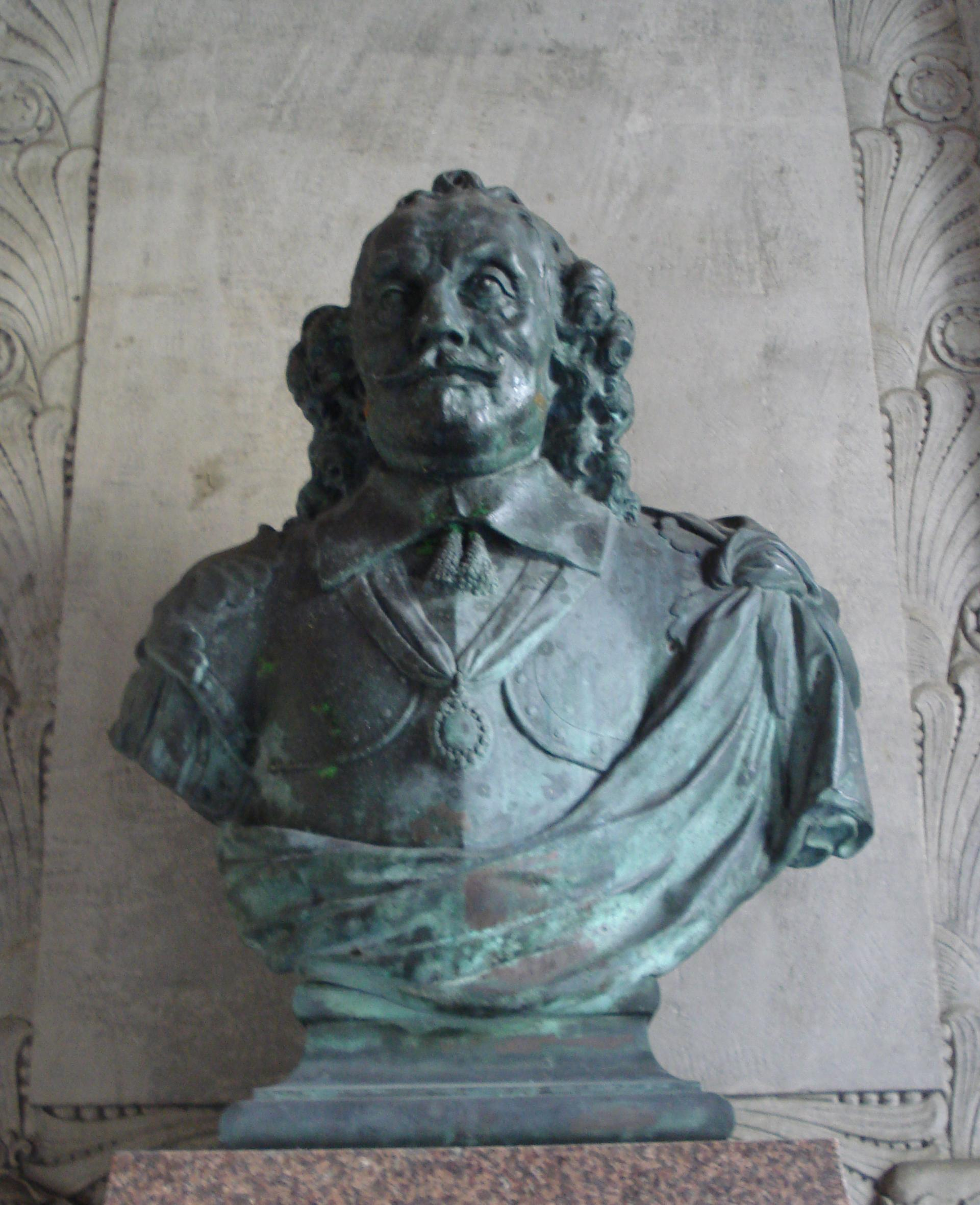 Rotterdam, stadhuis Coolsingel. Kunstwerk "Bestevaer" (Maarten Tromp). Rotterdam/The Netherlands.